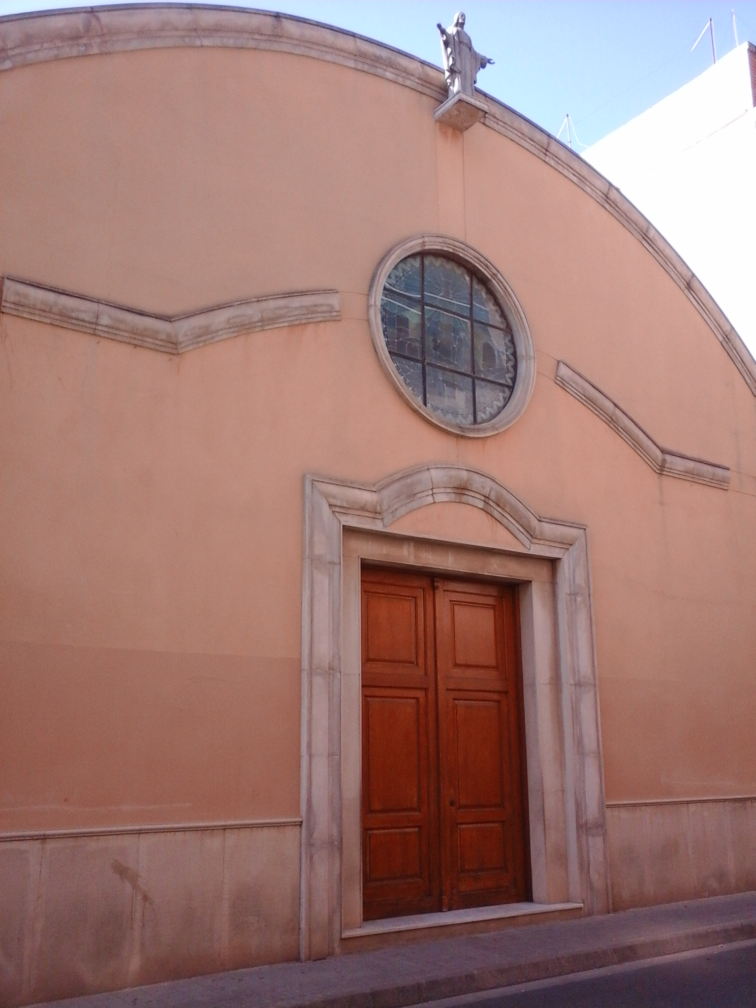 Església parroquial del Salvador i la Mare de Déu de la Salette (Aldaia) 14.021-004.